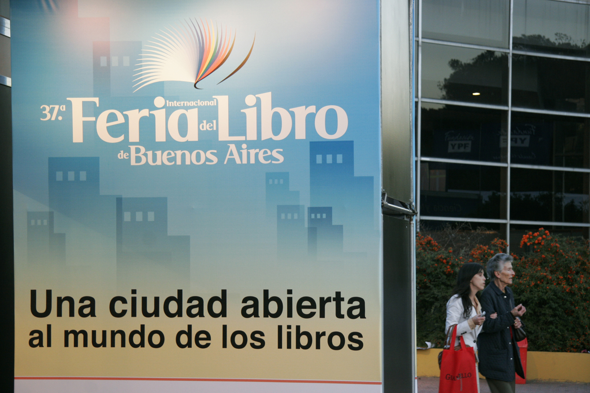 El evento se realizó en la celebración de la “La Noche de la Ciudad” en la Feria del Libro, en coincidencia con la fecha en que Buenos Aires se convirtió en Capital Mundial del Libro 2011, por decisión de la UNESCO. (Foto: Estrella Herrera).